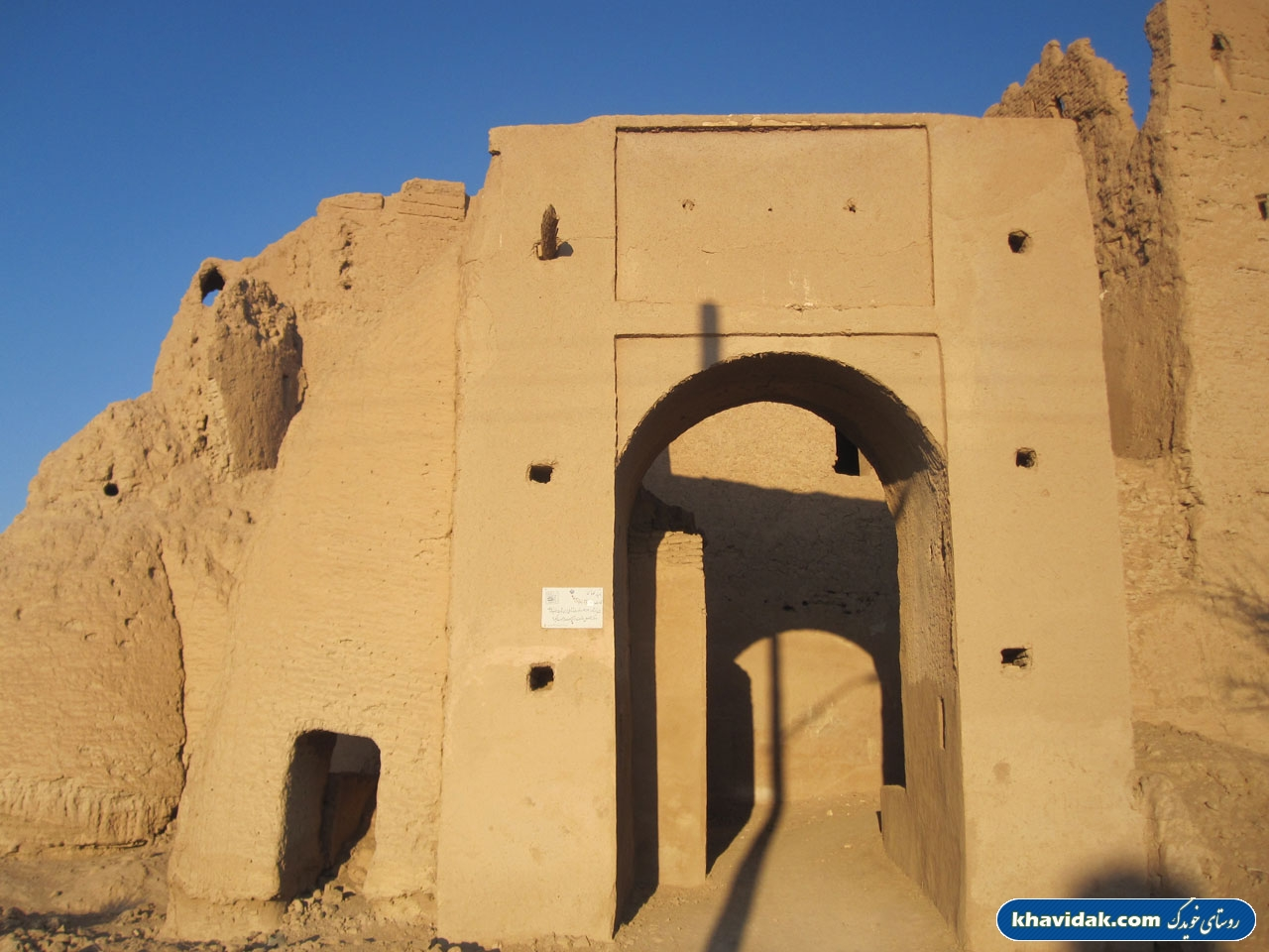 قلعه خویدک در زمان های قدیم که راهزنان به روستا ها حمله می کردند روستاییان برای حفظ جان خود به درون قلعه خویدک میرفتند. این قلعه بسیار گسترده است به طوری که گویااین قلعه خود یک روستای بزرگ بوده است .